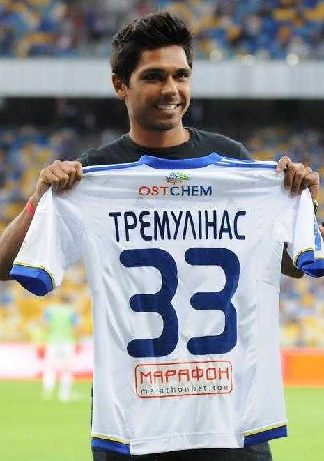 Бенуа Тремулінас на презентації в Динамо (Київ)